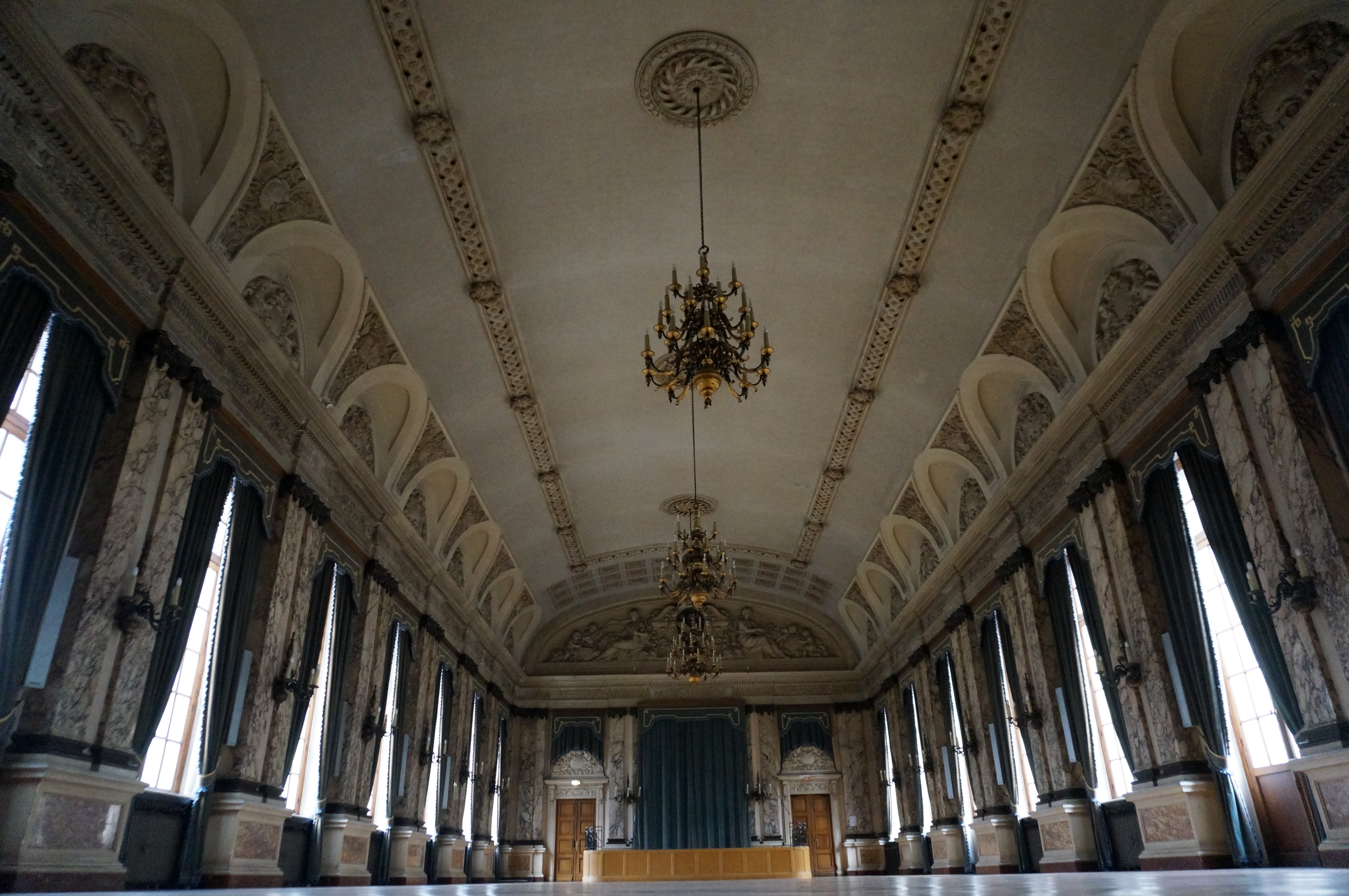 Grand salon de l'Hôtel de ville de Troyes.